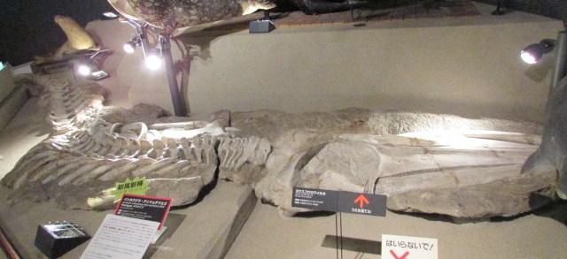 神奈川県立生命の星・地球博物館にあった化石です(パラタイプですが)。